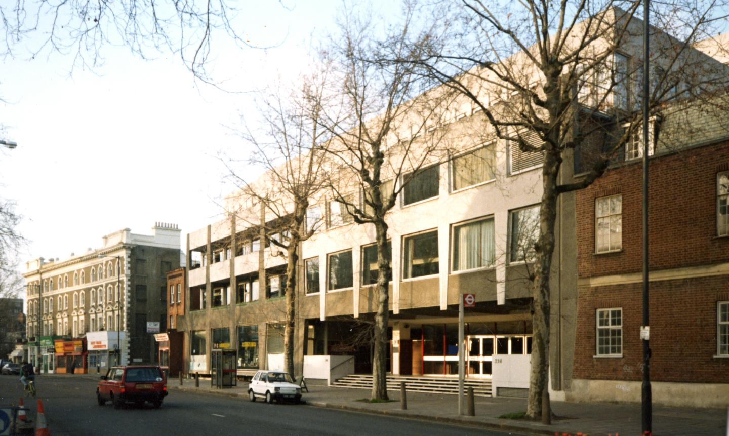 Budynek Polskiego Ośrodka Społeczno-Kulturalnego w Londynie (stan w 1992).